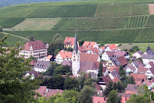 Ebringen. Blick auf Kirche und Rathaus. Juli 2005. Fotografiert von Roland Moriz.